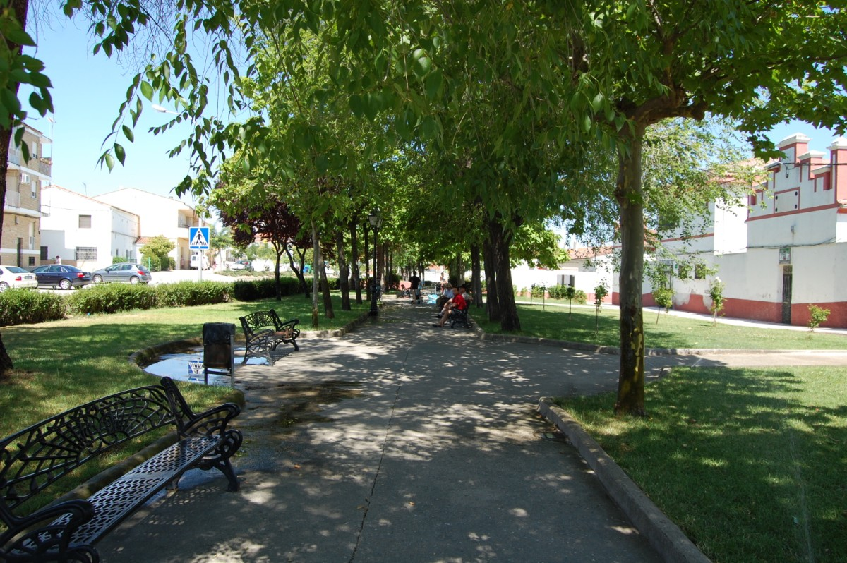 Parque en Carcaboso, provincia de Cáceres, España.